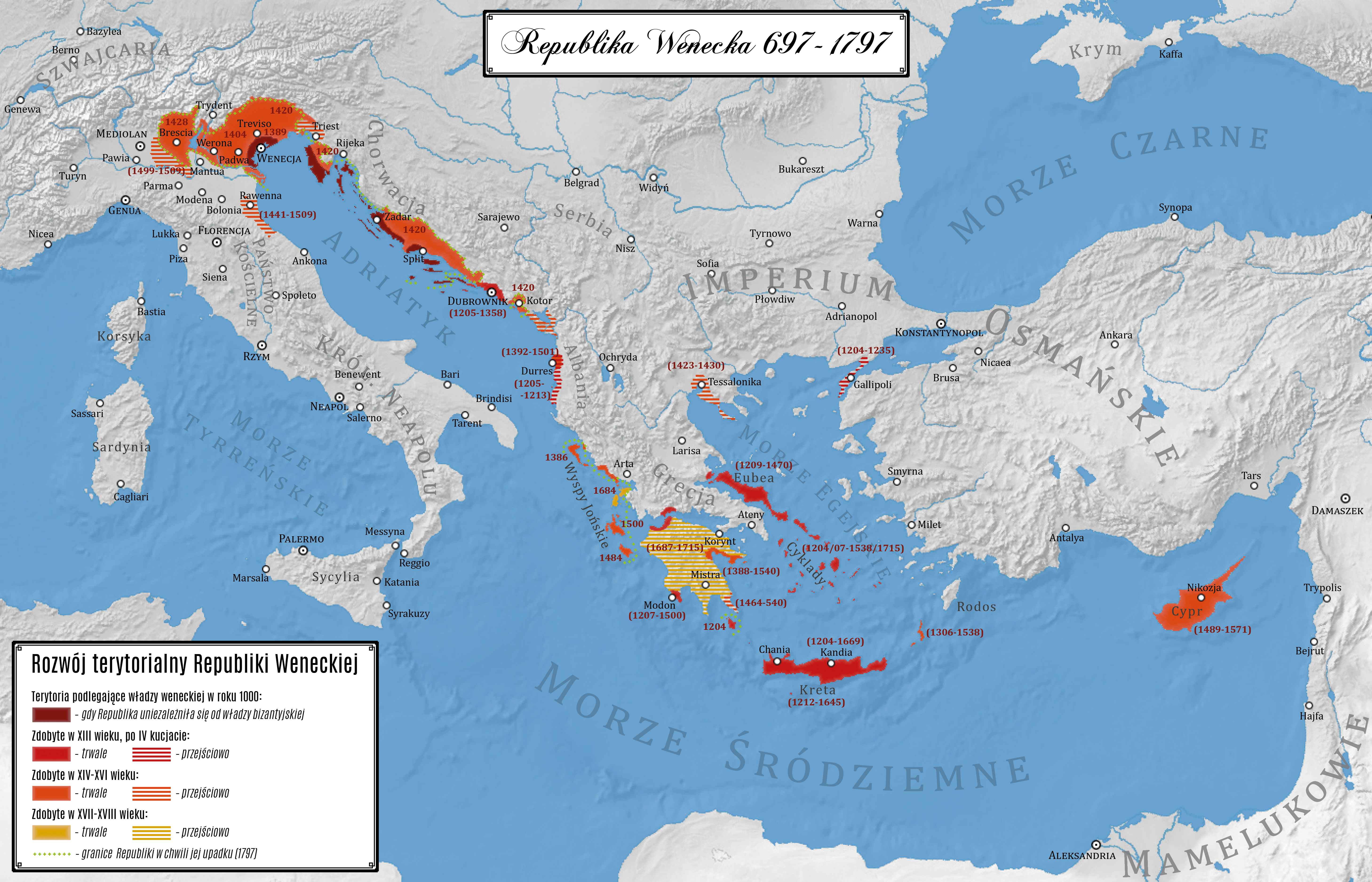 Rozwój terytorialny Republiki Weneckiej 697-1797